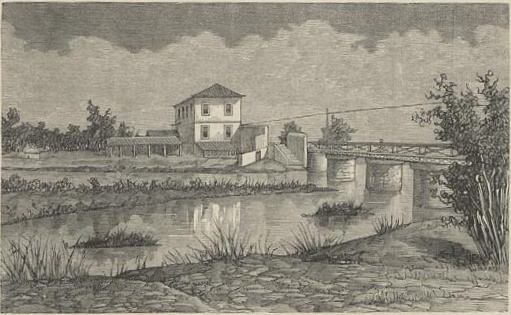 Casa do General Couto de Magalhães, em São Paulo (segundo uma fotografia de Lopes Mendes).